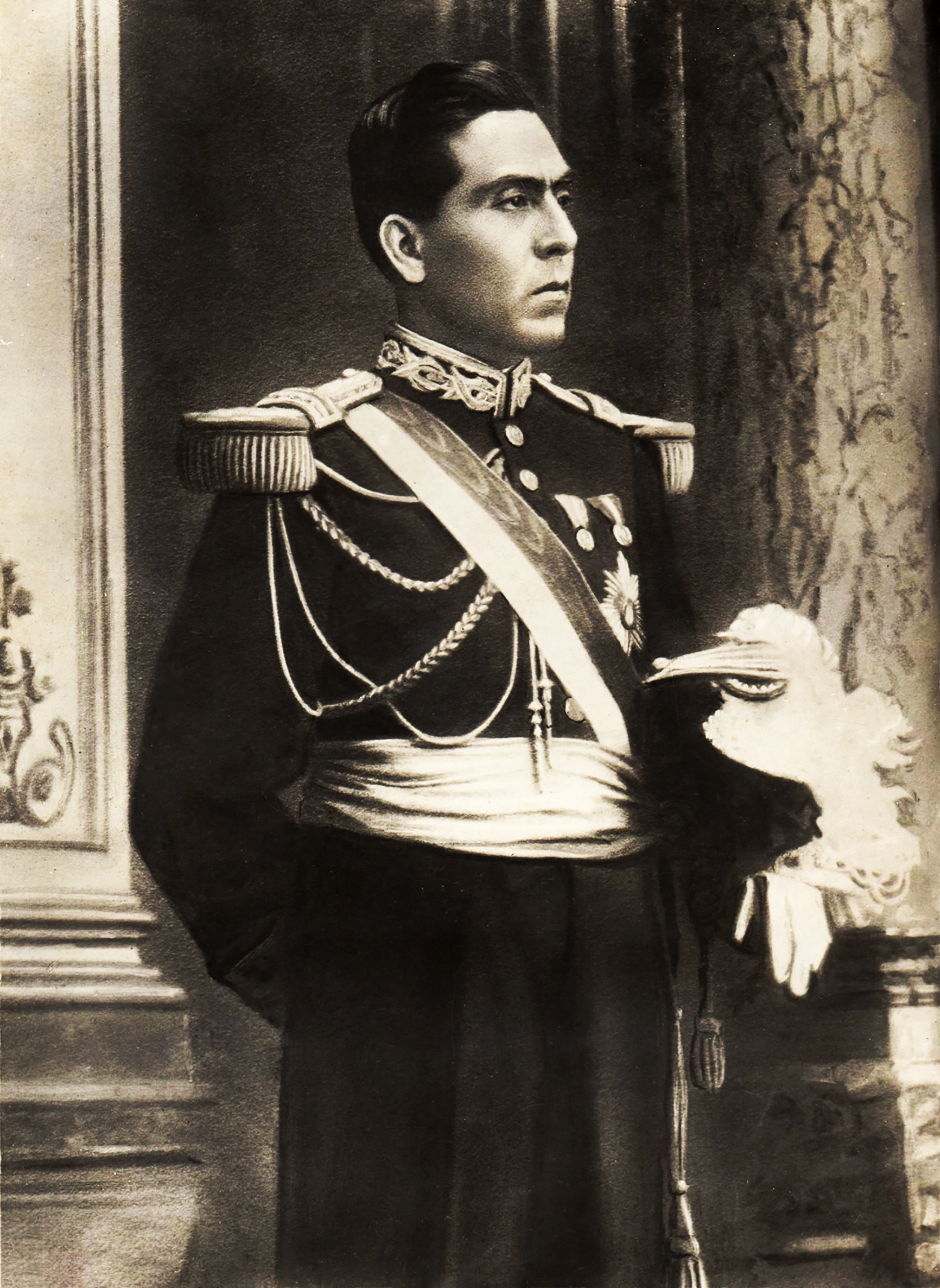 Perfil de Crl.Luis Miguel Sanchez Cerro, Presidente de la Republica del Perú en 1930